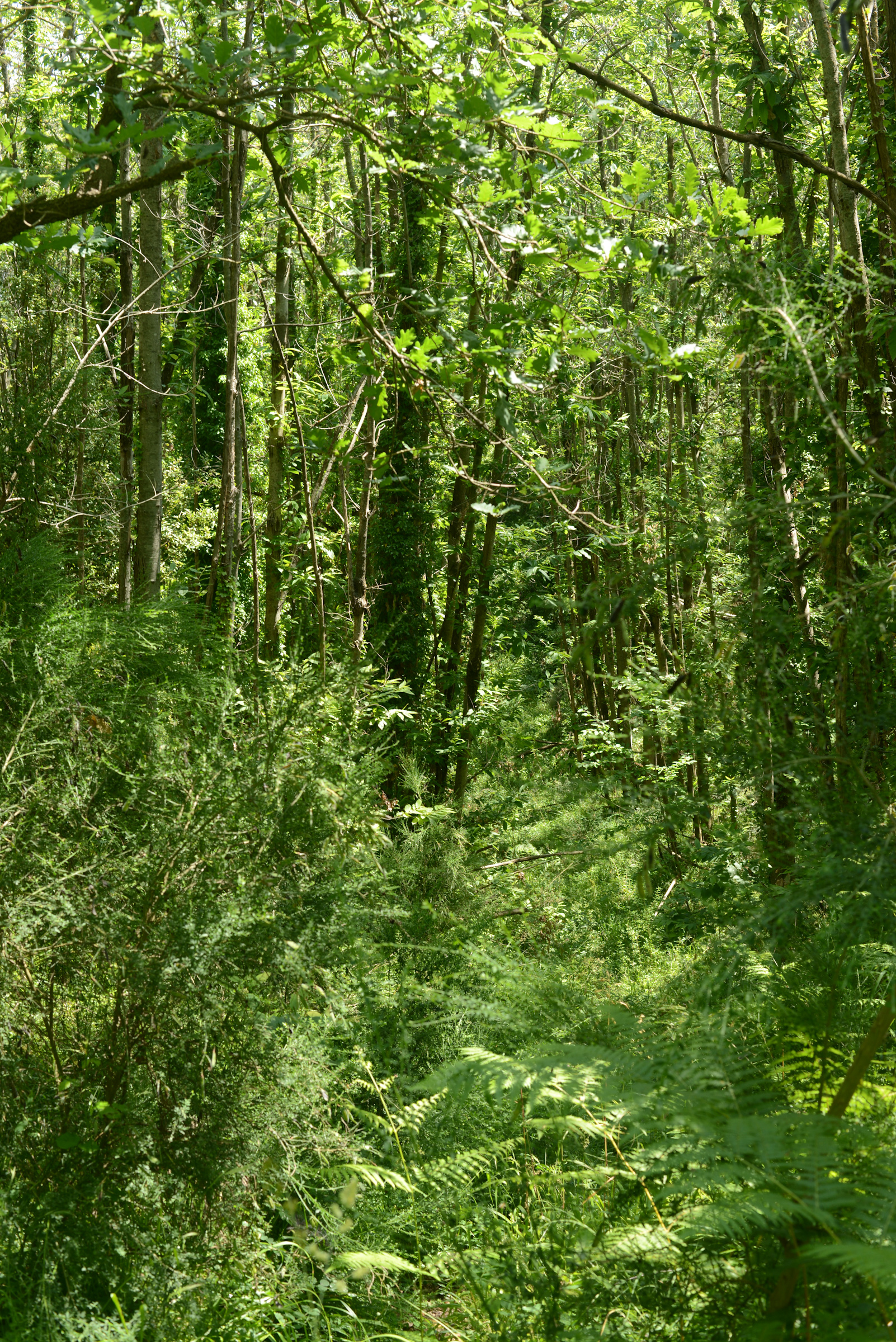 Nel fitto del bosco dei Camaldoli